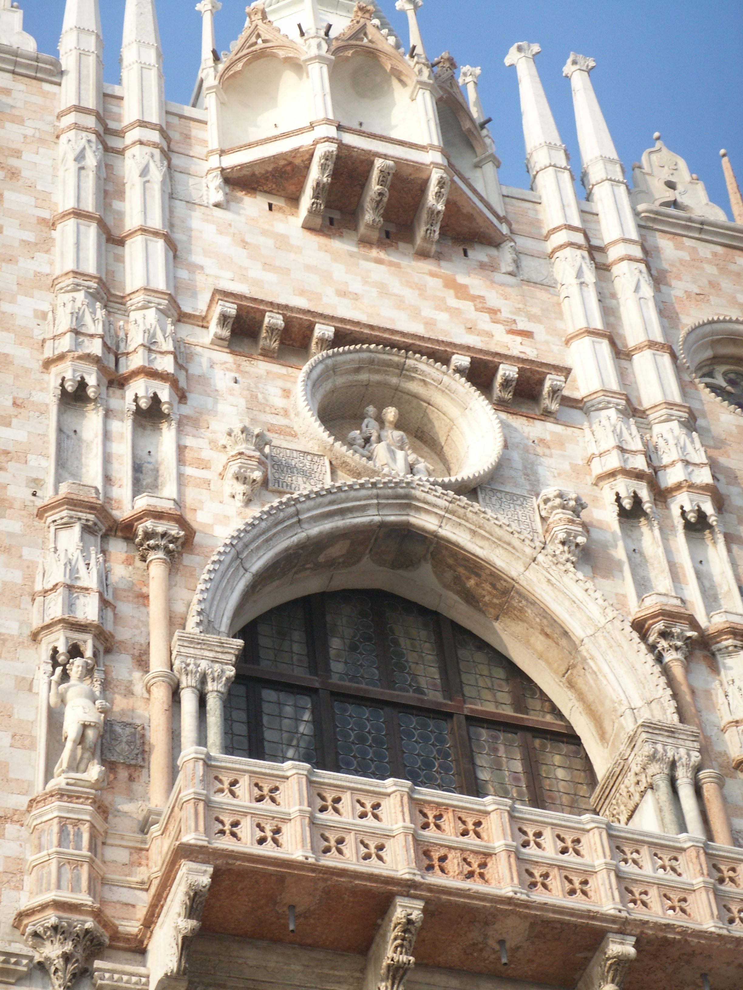 Dogenpalast, Venedig; Pierpaolo and Jacobello dalle Masegne, 1400-1404